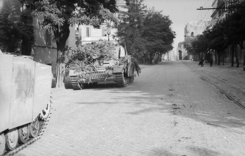 Information added by Wikimedia users.Carro armato nazista a via Giolitti nel 1944.